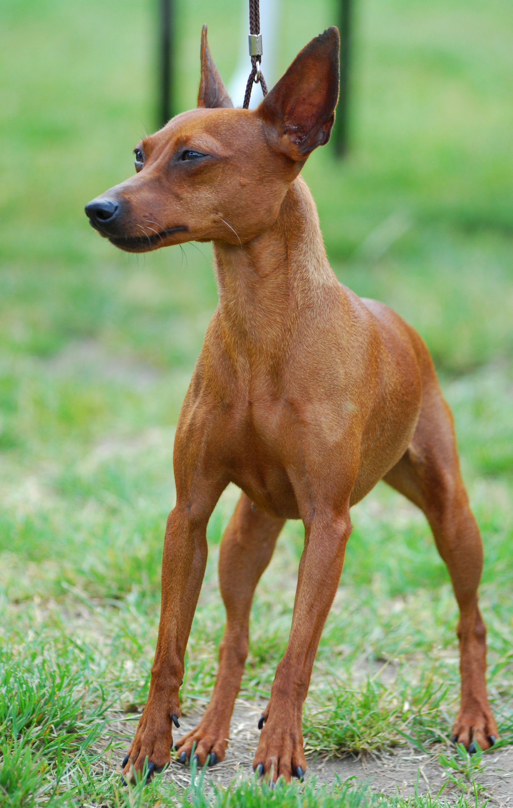 Pinczer miniaturowy